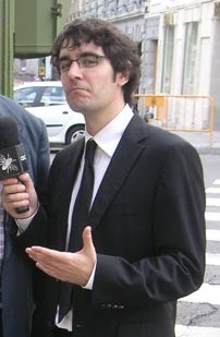 El presentador y reportero de CQC Juanra Bonet, (Barcelona, 1975).